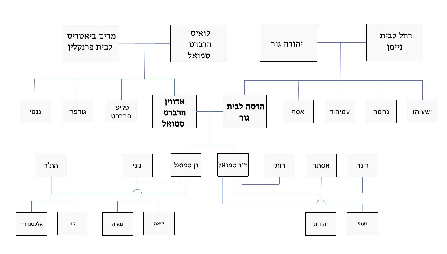 משפחתה של הדסה סמואל